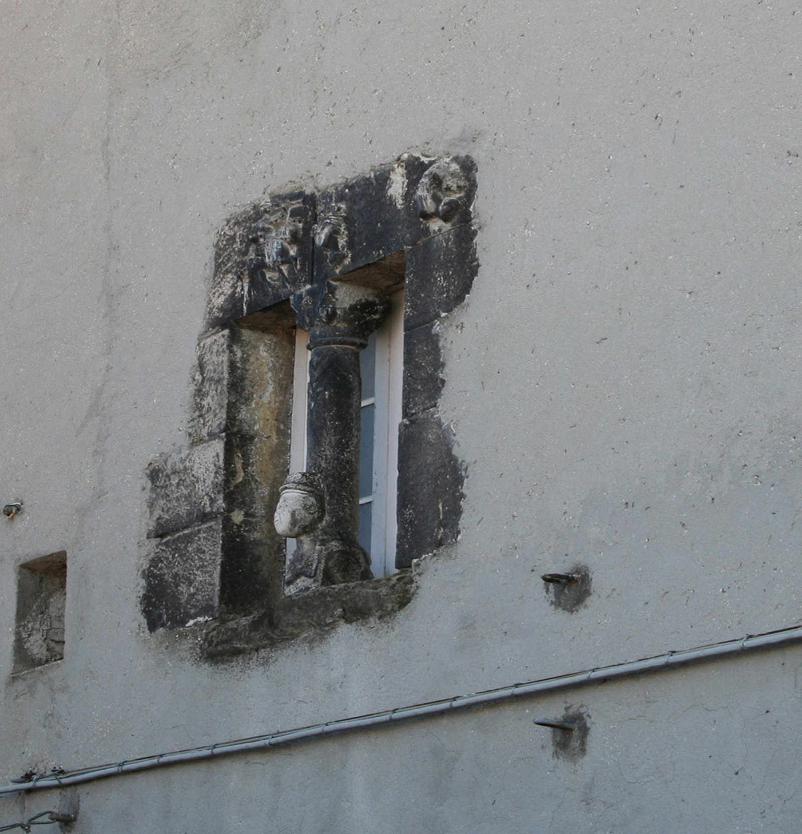 Pietracamela in provincia di Teramo. Bifora del 1400 sulla facciata della casa de “Li Signuritte”. Interno del paese.